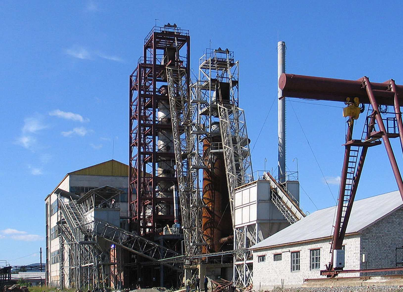 Фото сучасного стану заводу ПЛК